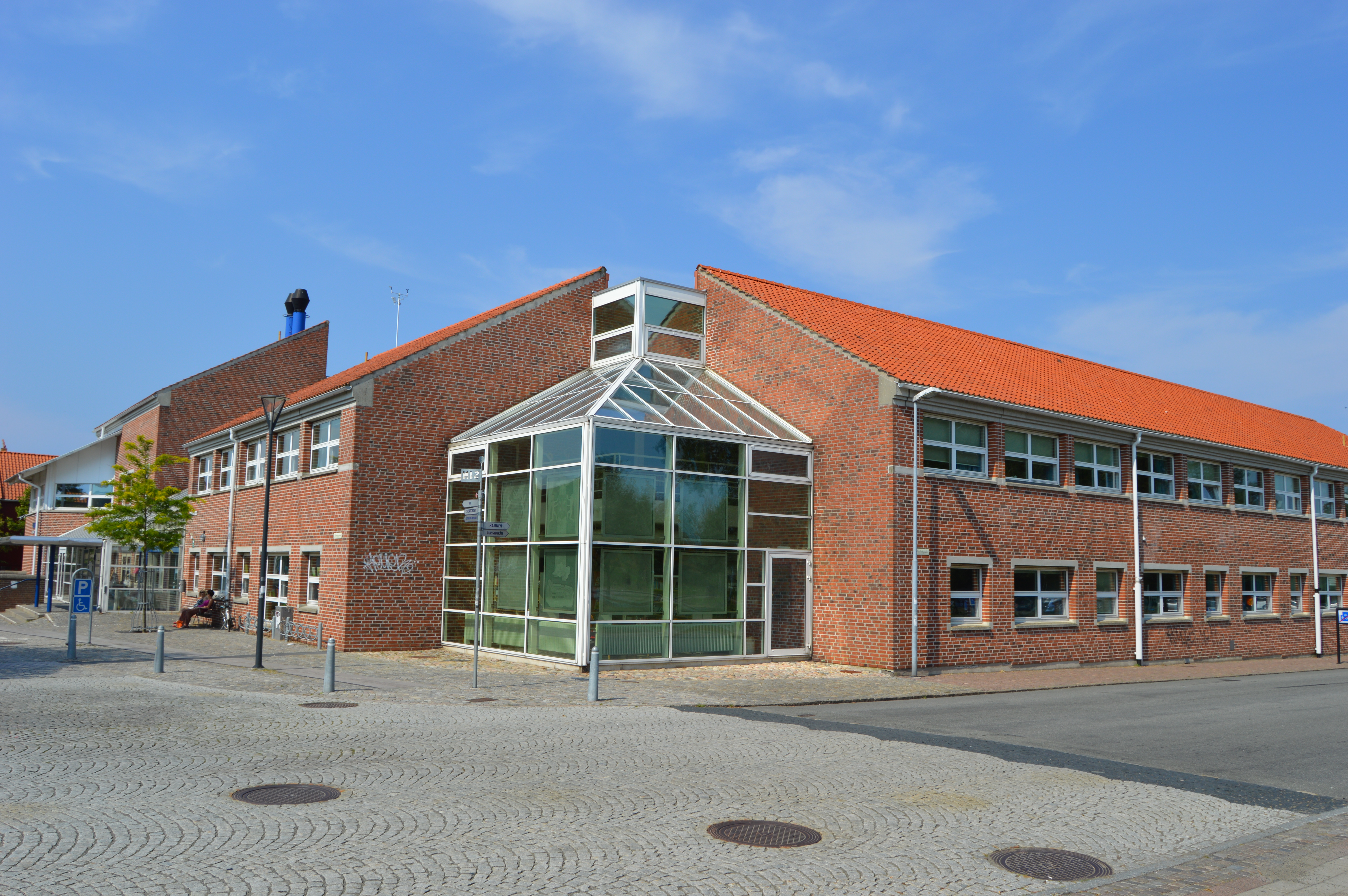 Simrishamns bibliotek